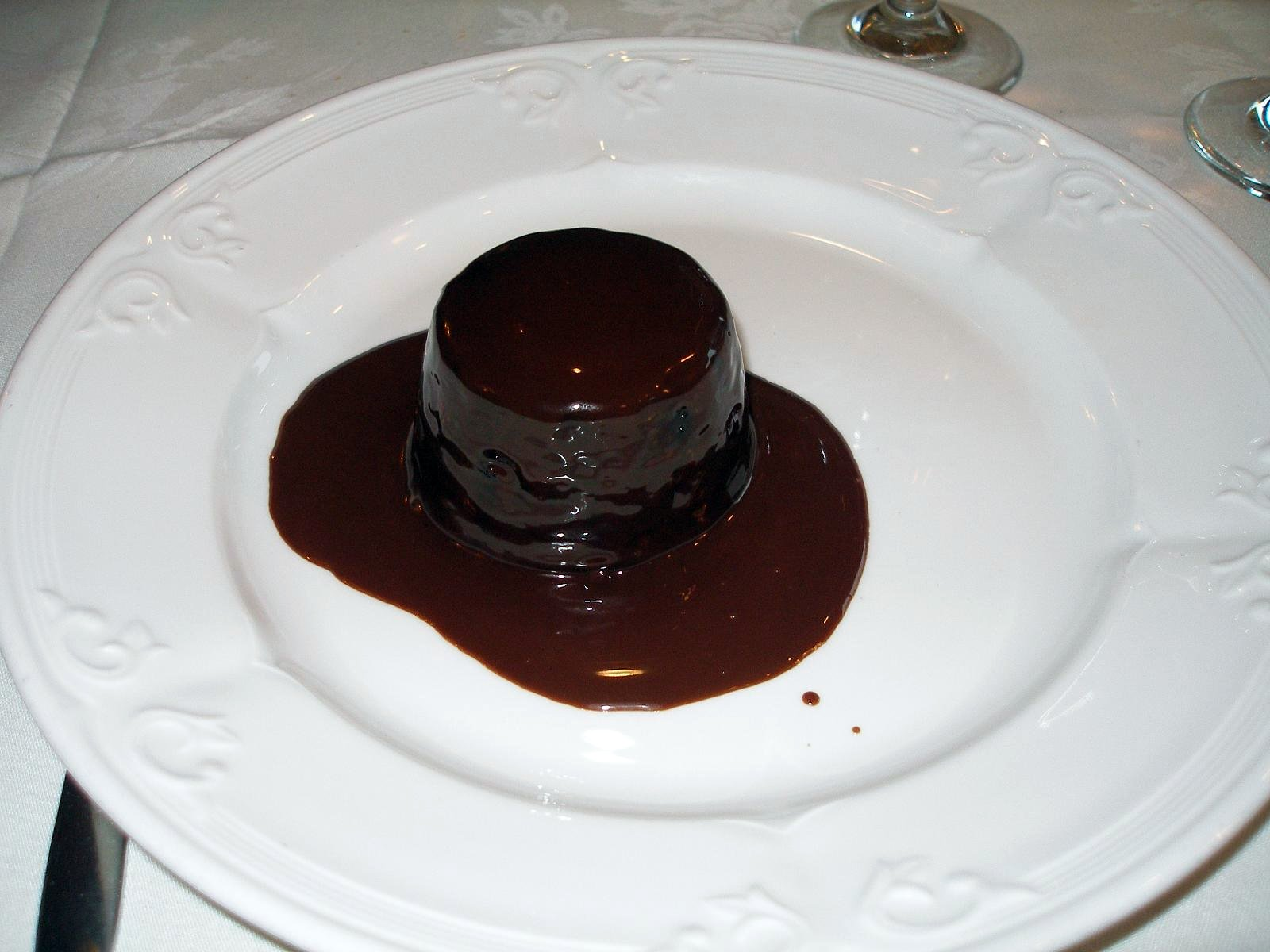 Warm chocolate lava cake